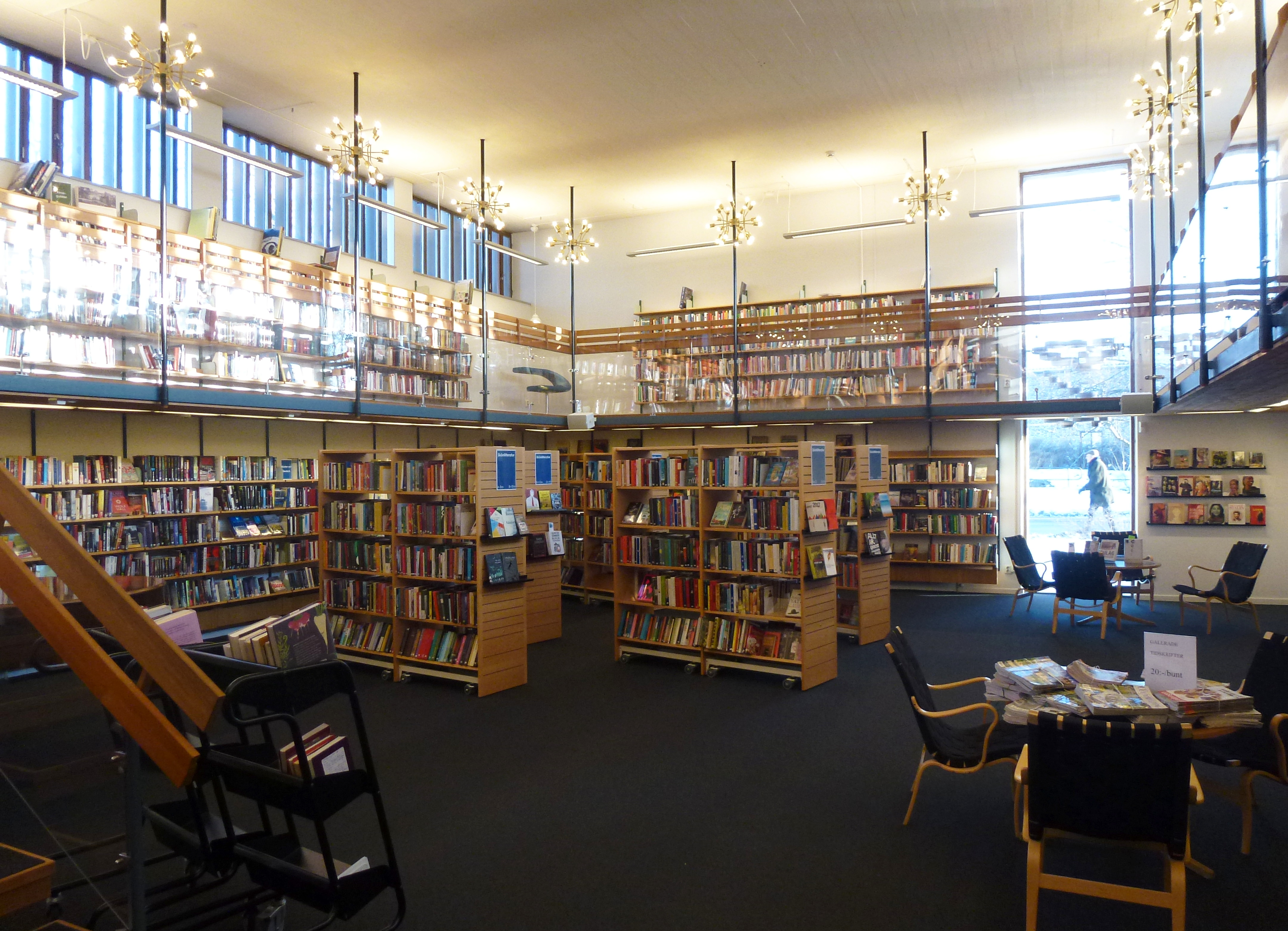 Djursholms bibliotek, arkitekt Åke Widström